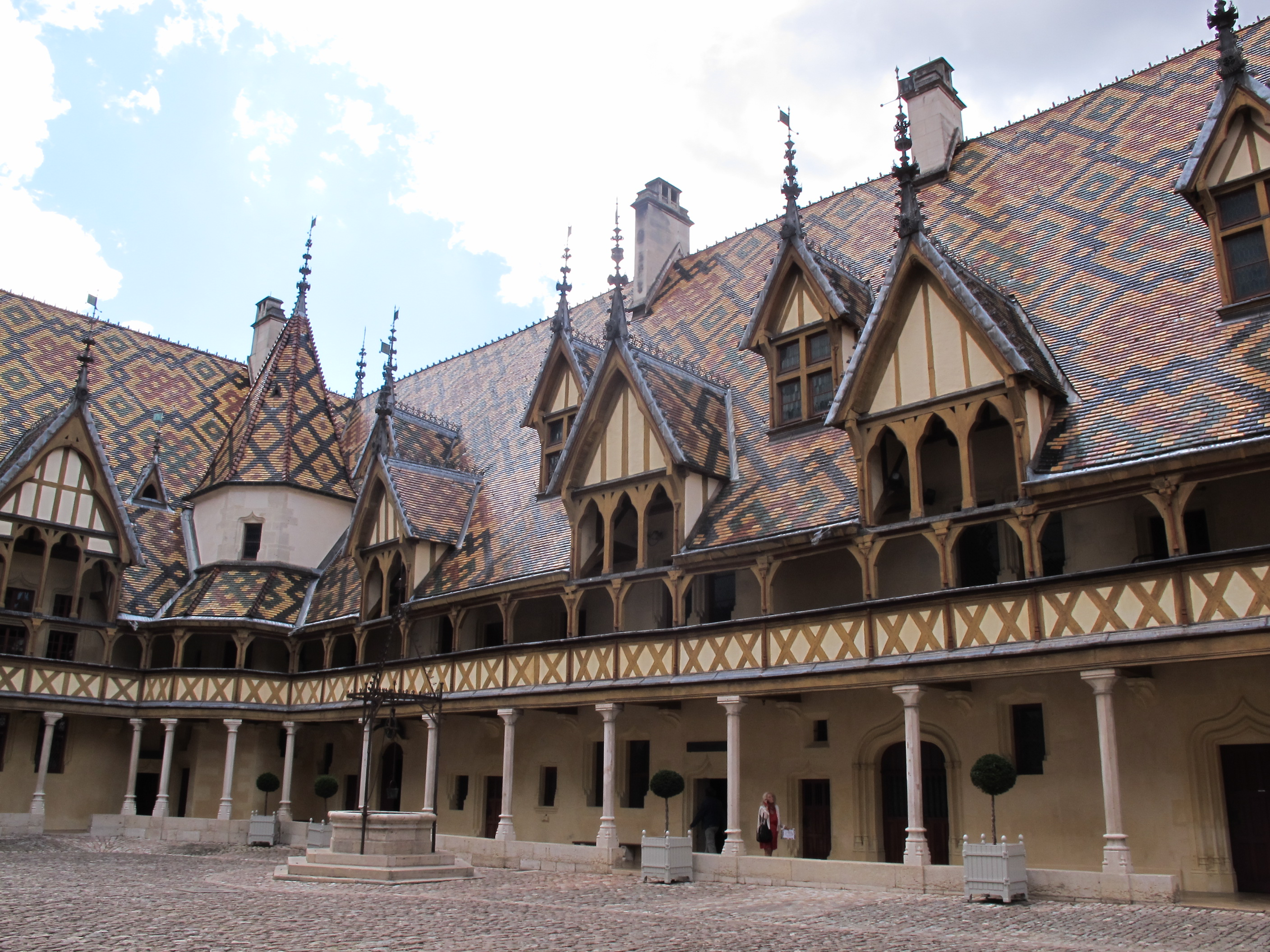 Cour de l'Hôtel-Dieu de Beaune